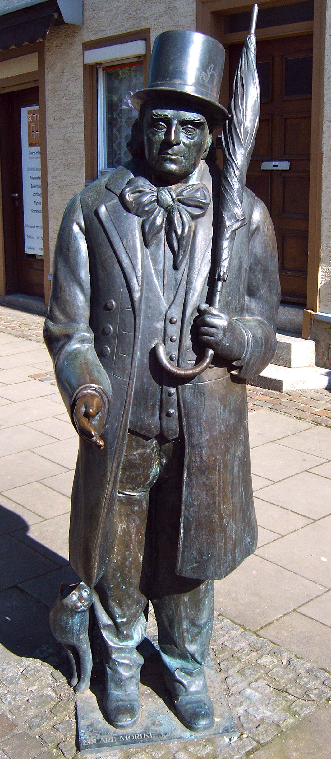 Eduard Mörike und Kater „Weißling“, Plastik von Maria Kloss in der Hauptstraße in Lorch vor Mörikes Wohnhaus, erstellt 1990